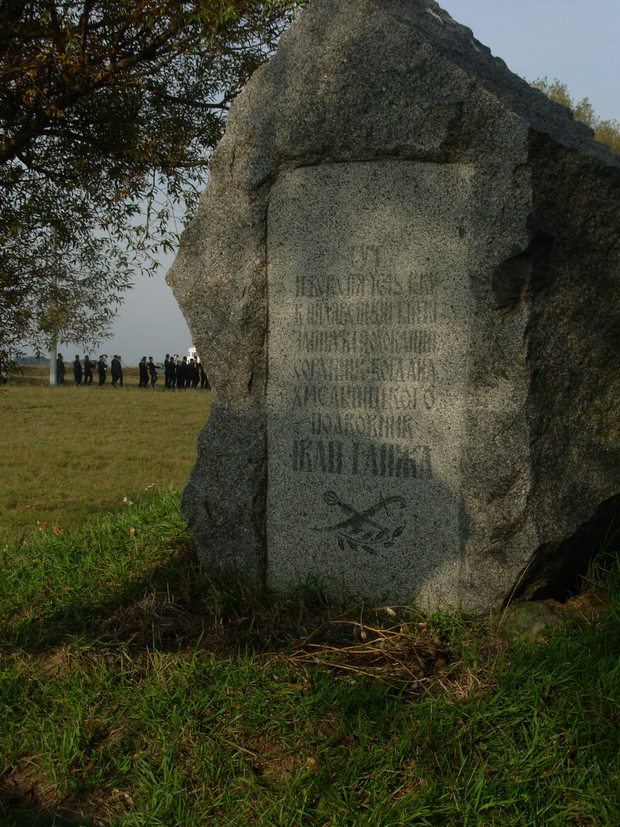 Пам’ятний знак на місці загибелі полковника Івана Ганджі 11 вересня 1648 року поблизу с. Пилява Хмельницької обл.